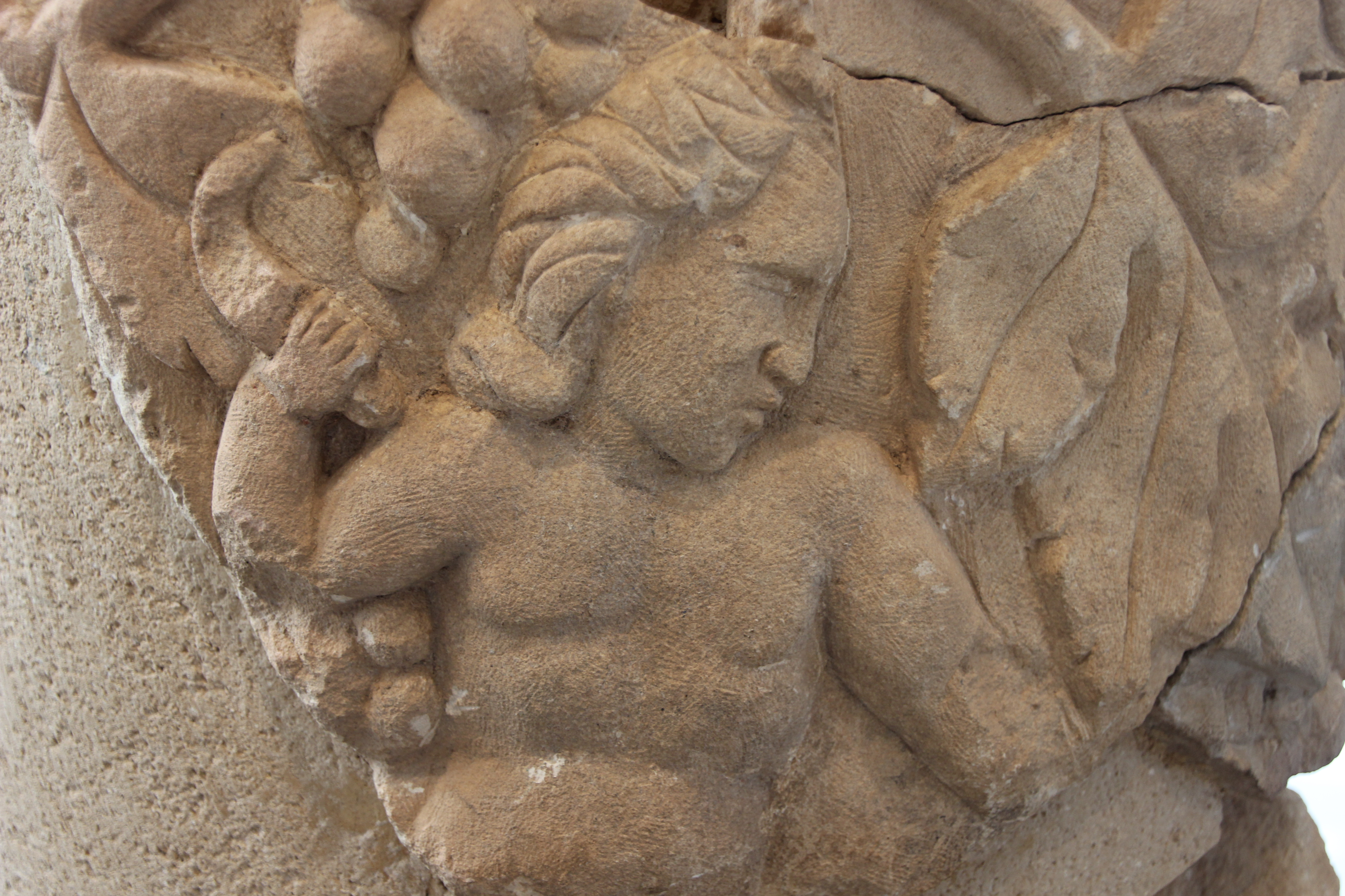 Sculpture provenant de la villa au grand péristyle de Vieux